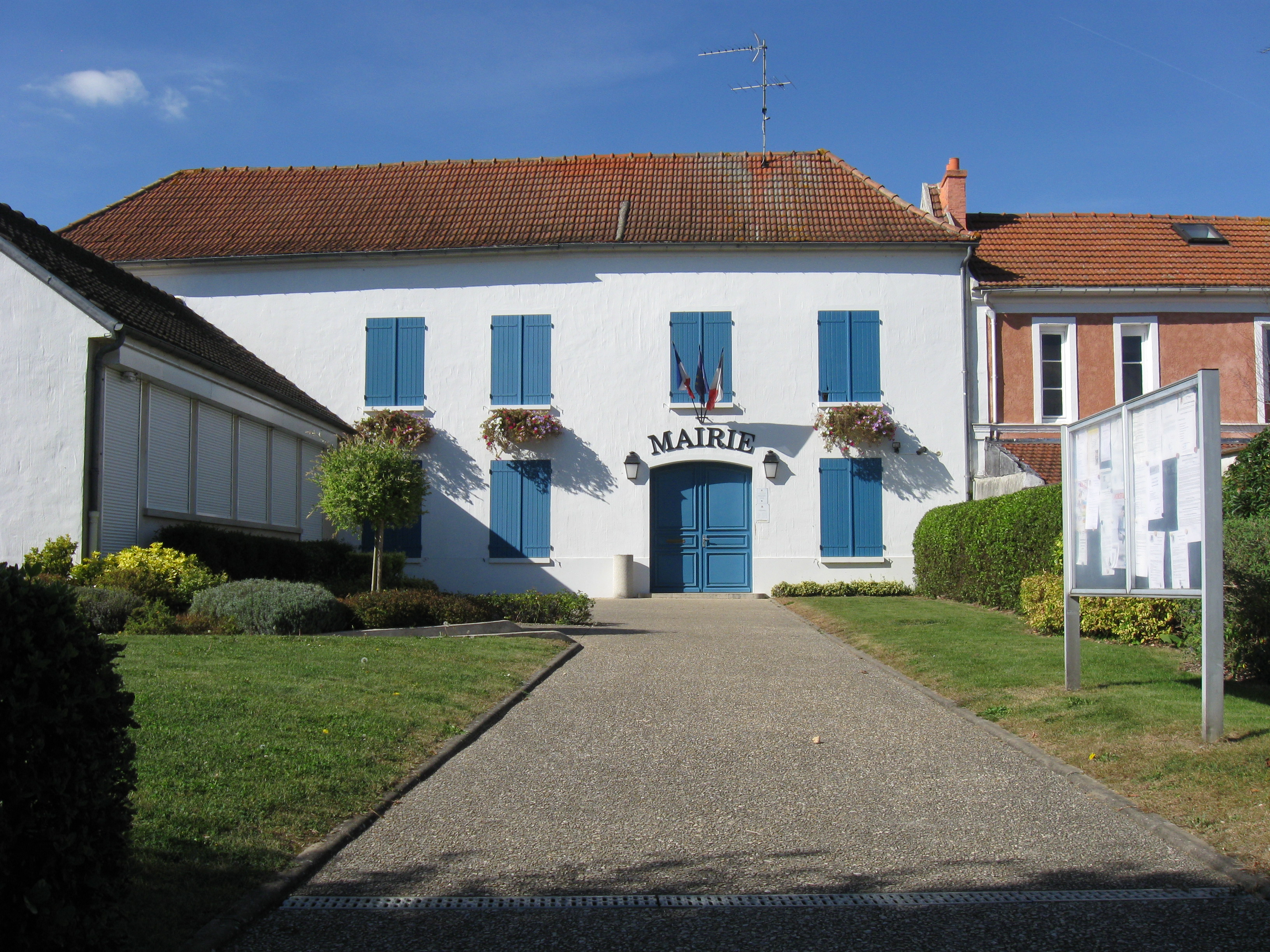 Mairie de Précy-sur-Marne. (Seine-et-Marne, région Île-de-France).